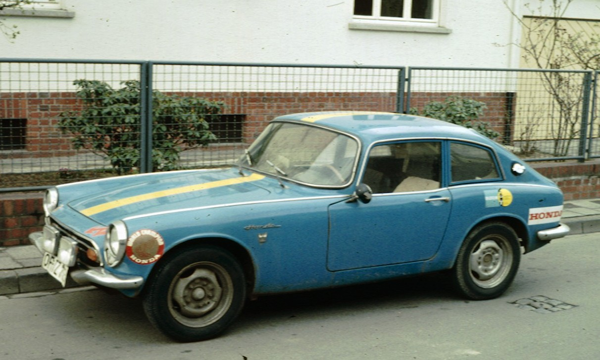 Honda S800 in Hessen